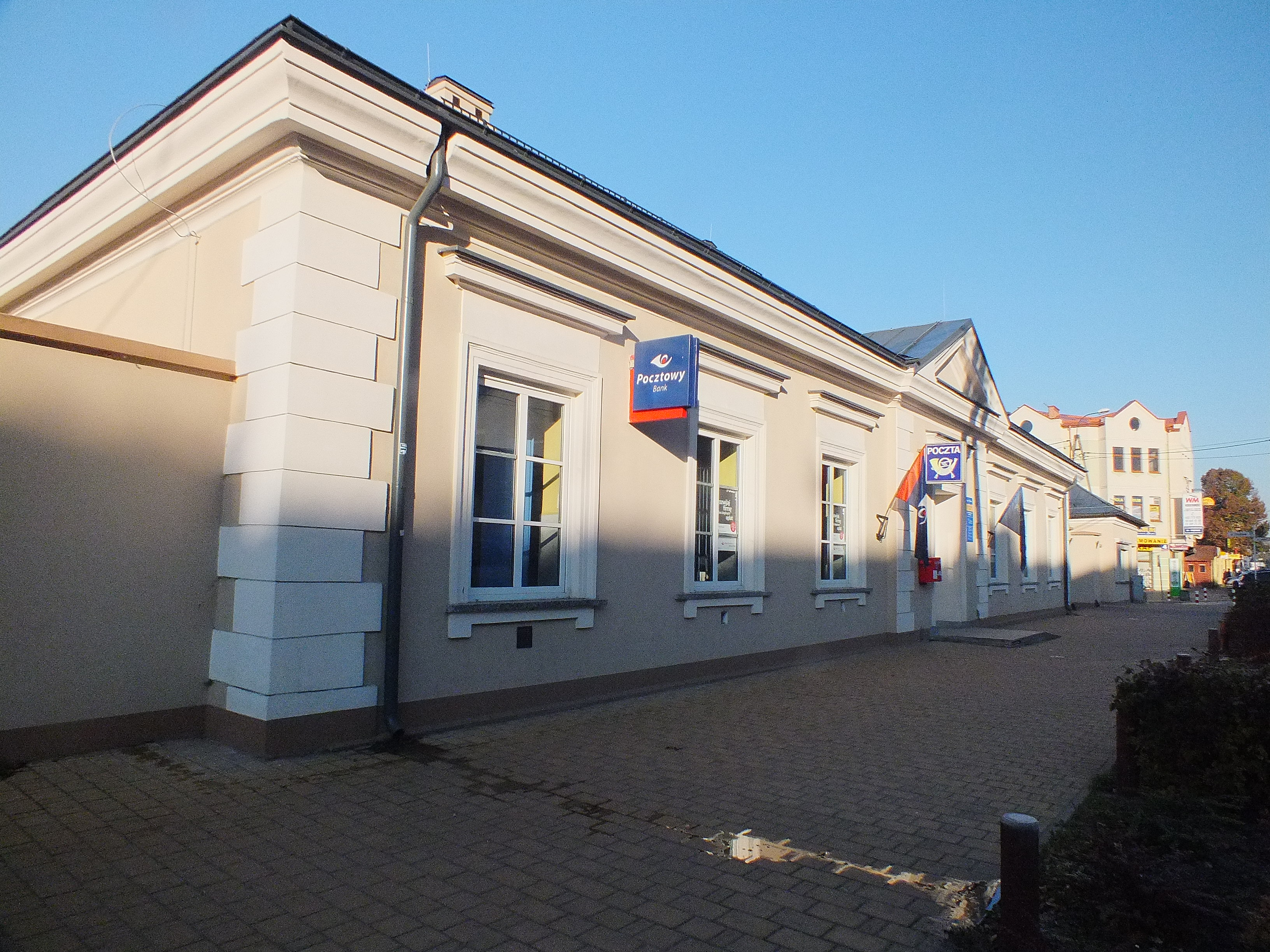 Grójec, poczta, XIX